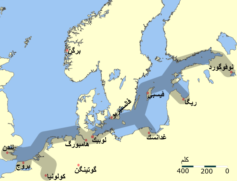 طُرق التجارة الرئيسيَّة لِأعضاء الرابطة الهاينزيَّة في شمال أوروپَّا.